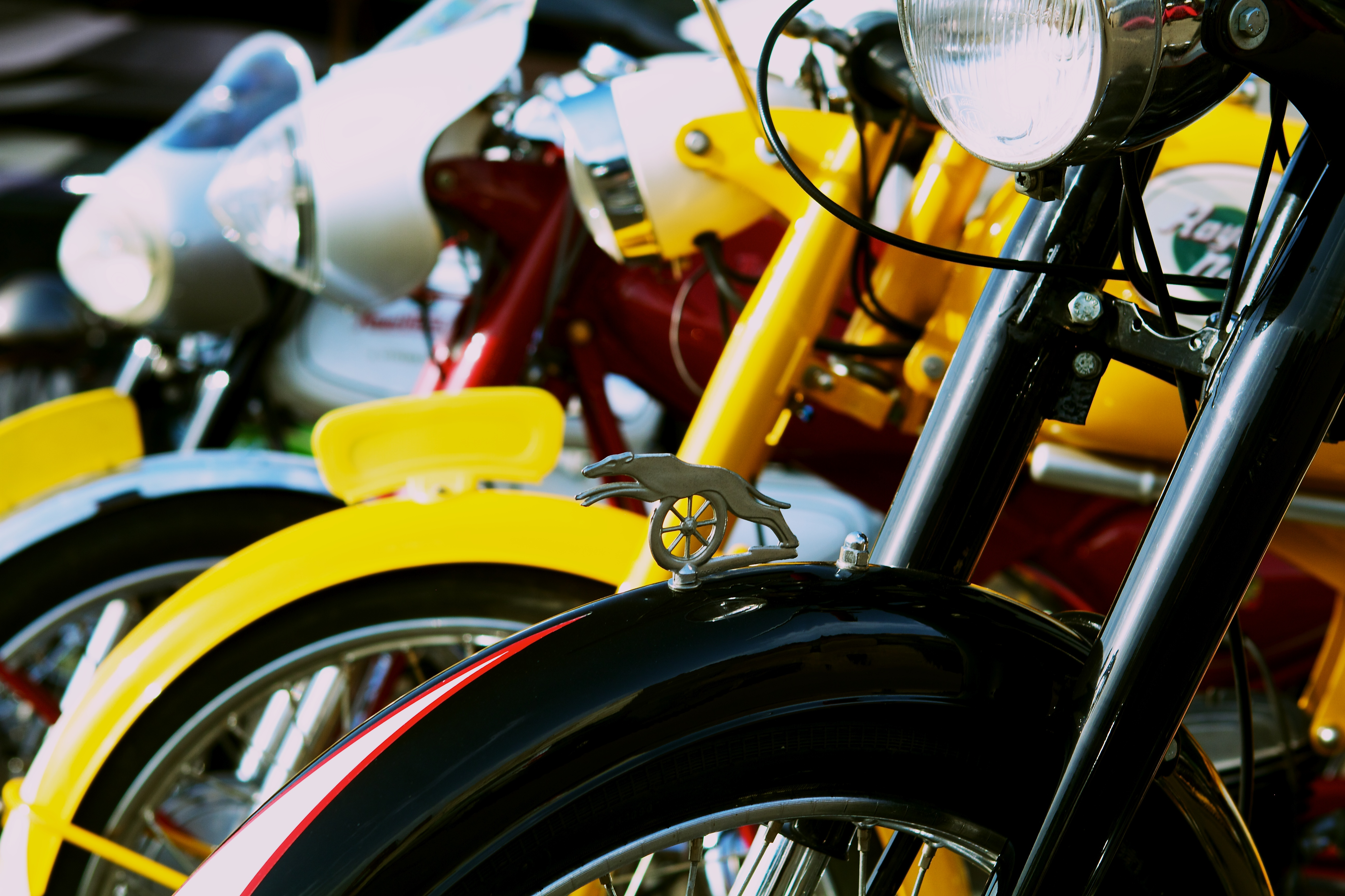 Afgebeeld de koplampen van een 4-tal Royal Nords.